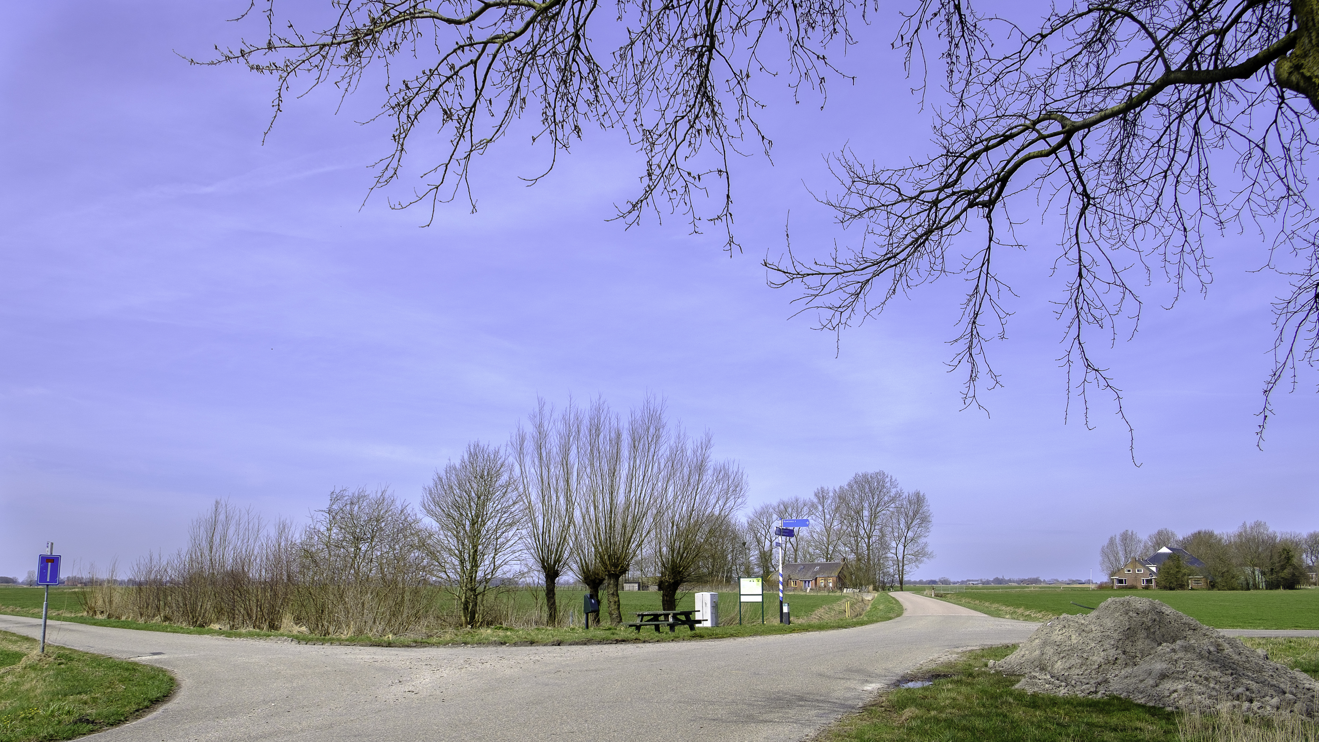 De vroegere locatie van de krimpjes (arbeiderswoningen) Koffiebus (links van de weg, bij de picknickplaats) en Theebus (rechts van de weg)